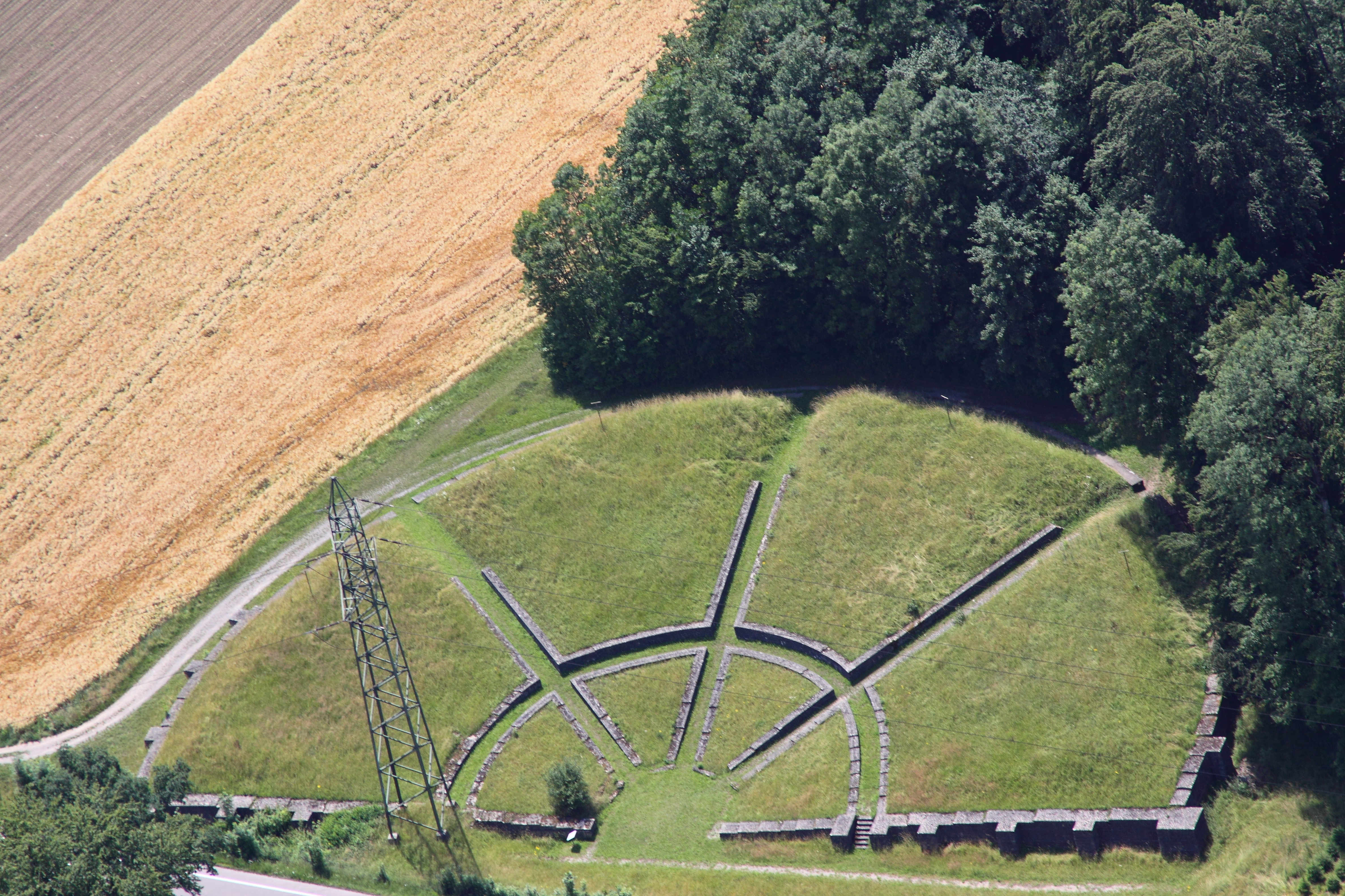 Römisches Theater Lenzburg